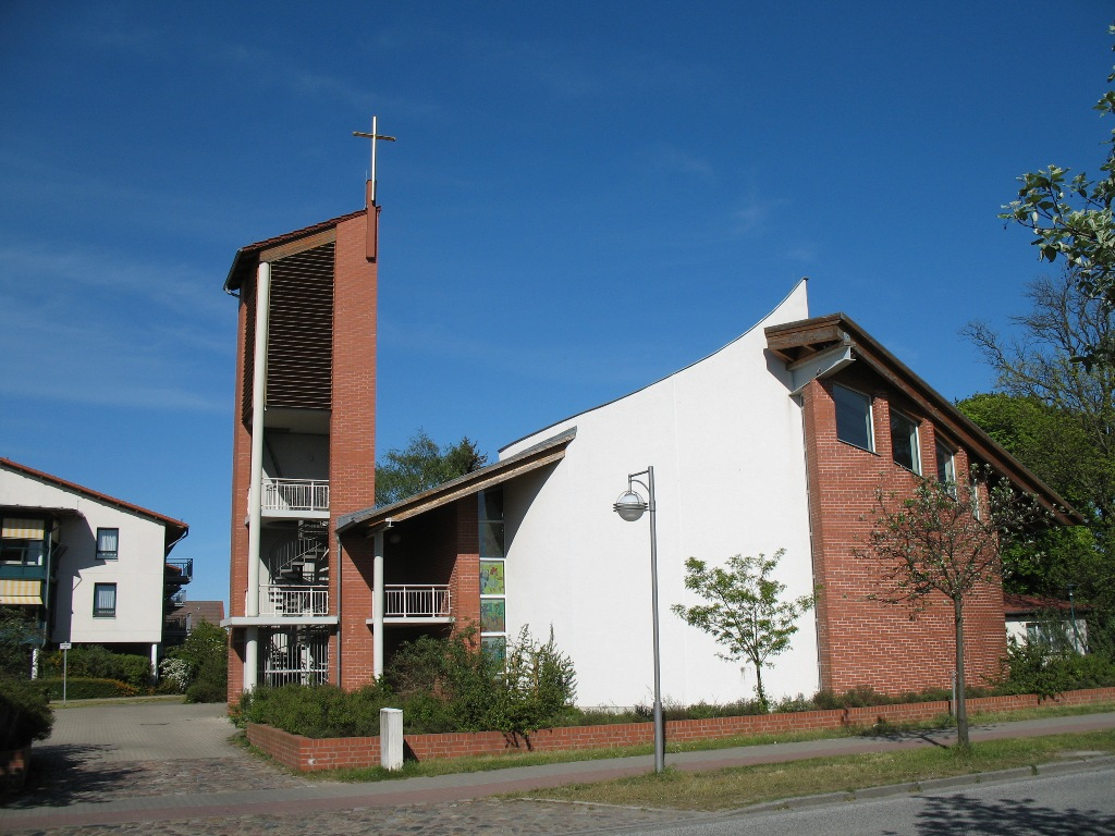 Die katholische St. Petruskirche in Teterow.